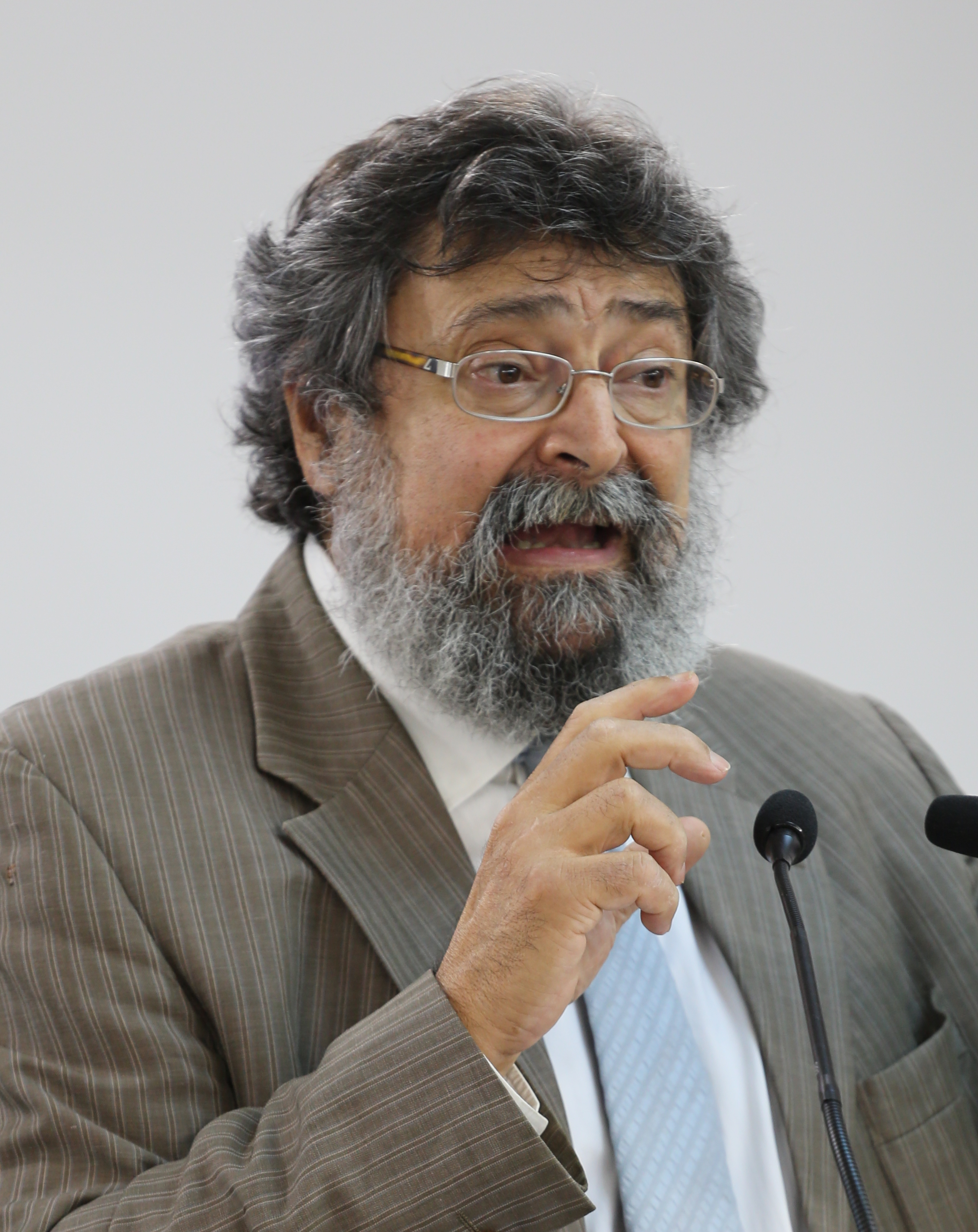 10.10.2014 #TapasHO con Francisco Caja